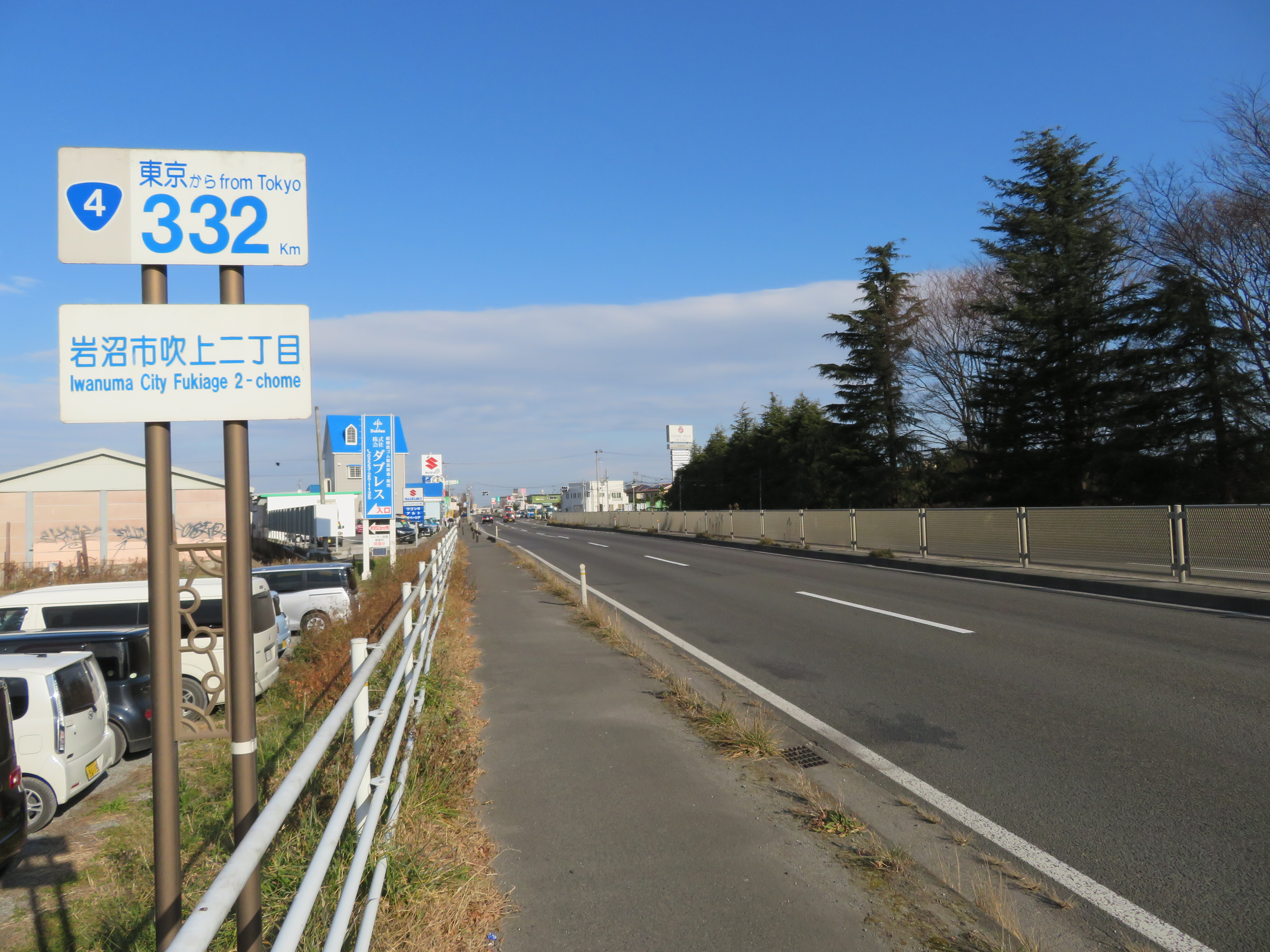 国道4号岩沼バイパス宮城県岩沼市吹上二丁目付近（仙台方面を撮影） Canon PowerShot SX720 HS